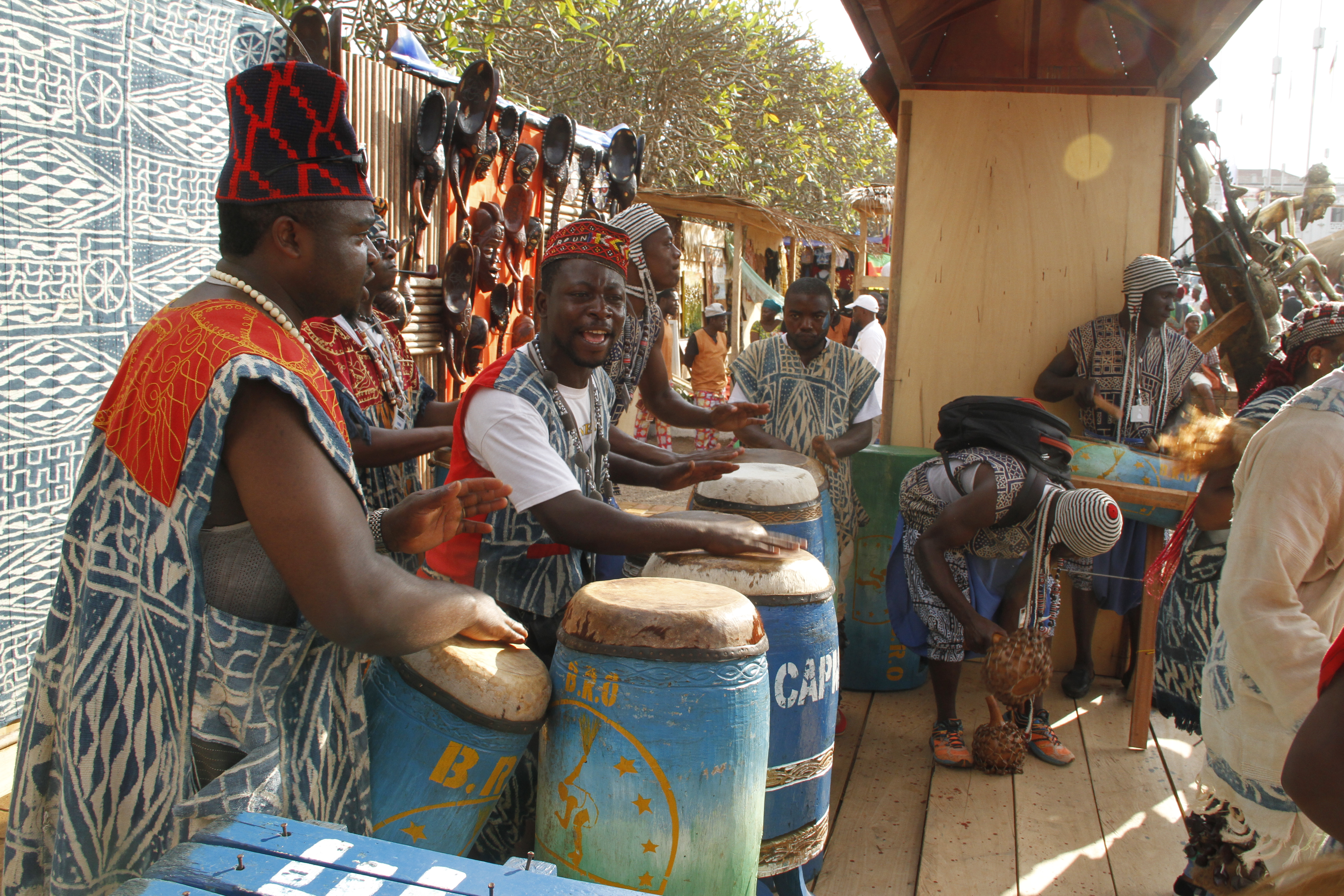 Joueurs de tam-tams de la région de l'ouest du Cameroun présenté lors du Fenac (Festival National des Arts et de la Culture) à Yaoundé au Cameroun This is an image from Cameroon